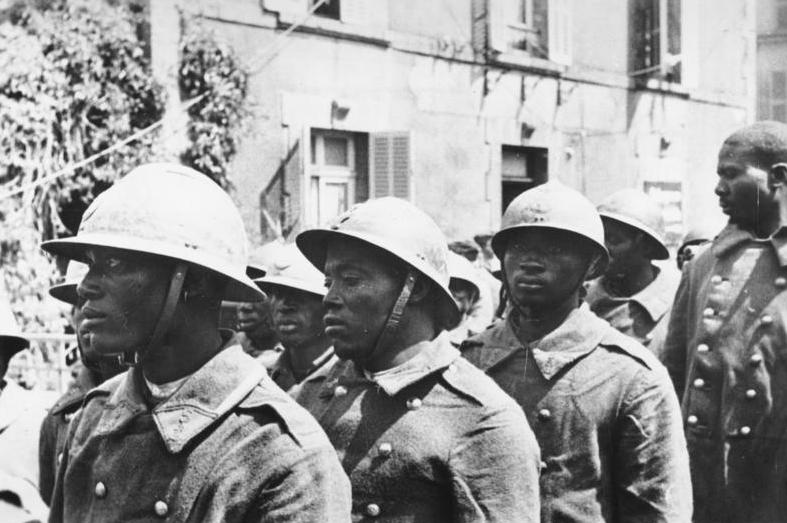 This description has been identified as biased or incorrect: yesKriegsgefangene französische Kolonialsoldaten Die "Retter Frankreichs" in Gefangenschaft Genau so wie im Kriege 1914/18 hat Frankreich seine farbigen Hilfsvölker wieder eingesetzt. Mord und Misshandlungen an wehrlosen Gefangenen, Brandstiftung im Operationsgebiet und Ausplünderung der Zivilbevölkerung das ist das Ergebnis und eine ungeheuerliche Anklage gegen Frankreich, dass das schändliche Treiben der Kolonialtruppen nicht nur duldet, sondern auch fördert. PK-Ulrich-Scherl 30.5.40